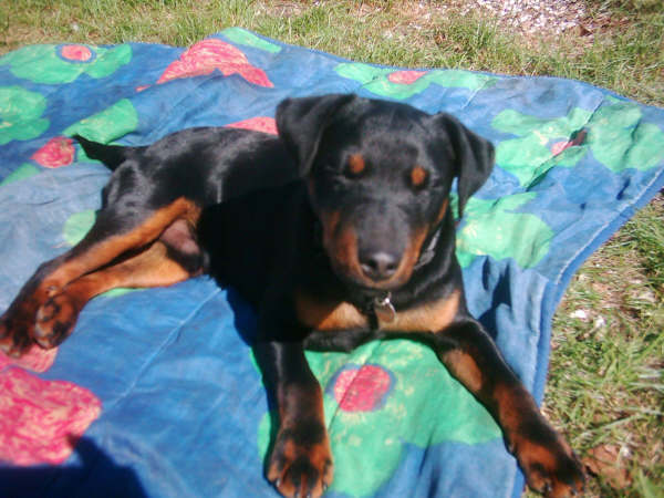 Tysk Jagtterrier (Uttrup's Quick/Vaks)